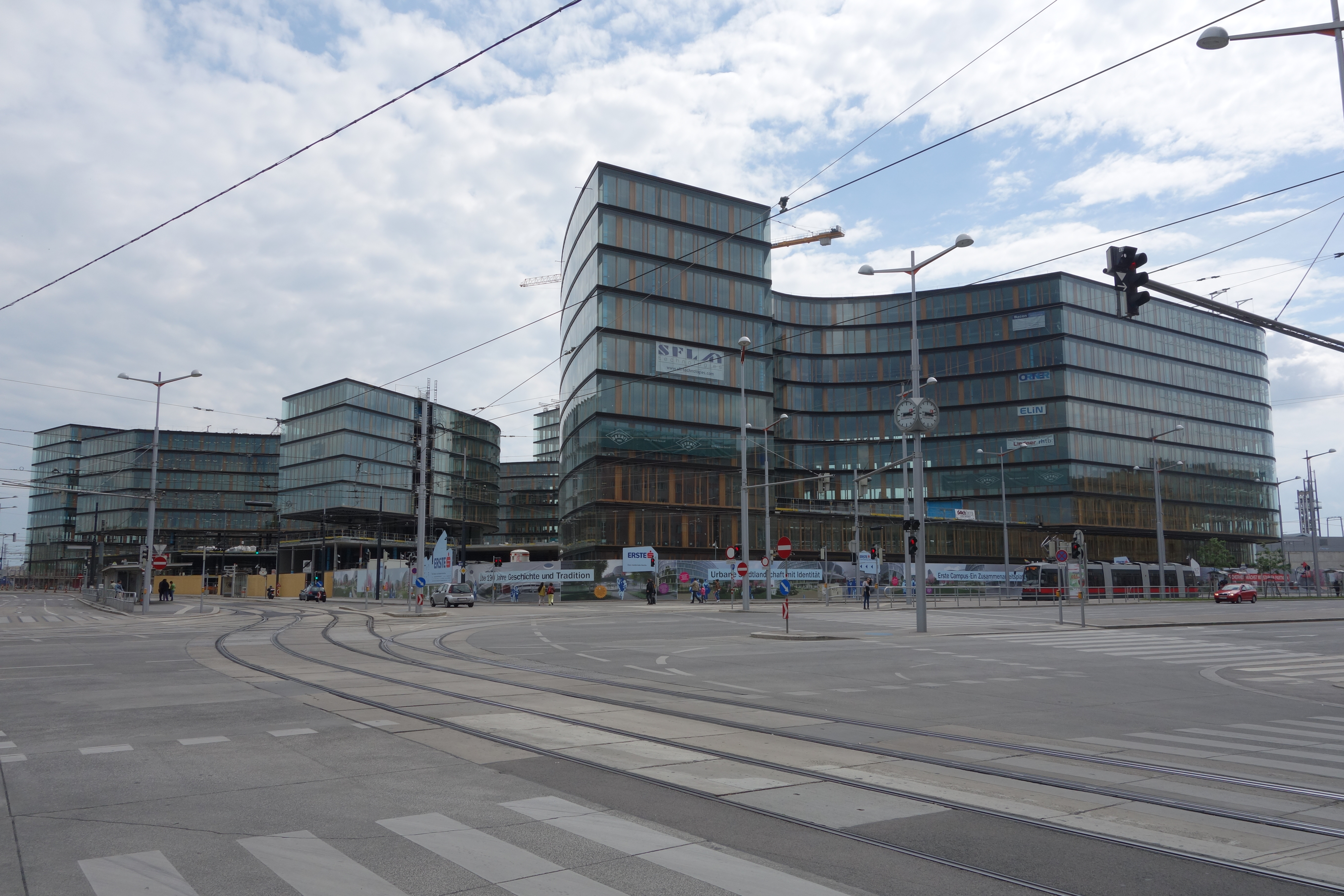 Der in Bau befindliche Erste Campus am Wiedner Gürtel im Juni 2014. Das Gebäude steht auf dem Bauplatz des ehemaligen Wiener Südbahnhofs. Ganz rechts im Bild ist der Aussichtsturm Bahnorama zu sehen.